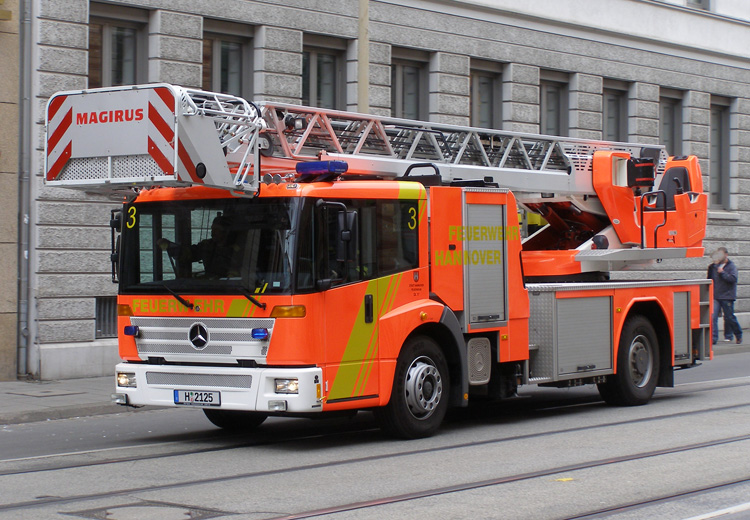 Drehleiter (DLK 23/12) der Feuerwehr Hannover